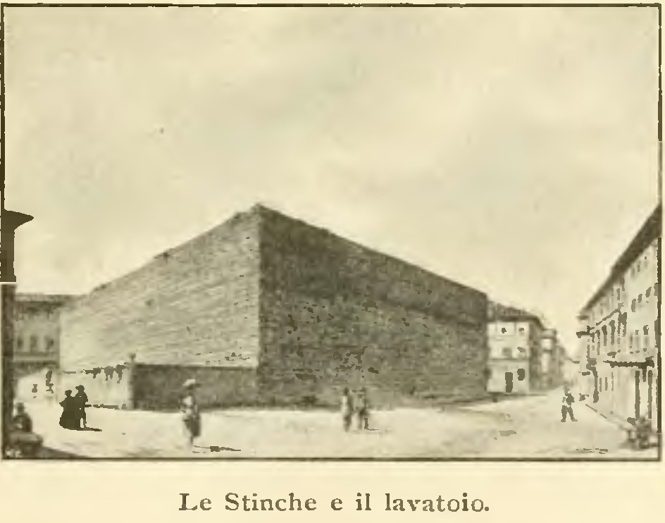 Carcere delle Stinche e lavatoio, da una vecchia riproduzione presente a p. 441 del libro: Giuseppe Conti, Firenze vecchia. Storia, cronaca anedottica, costumi. 1799-1859. Firenze. Bemporad, 1899.